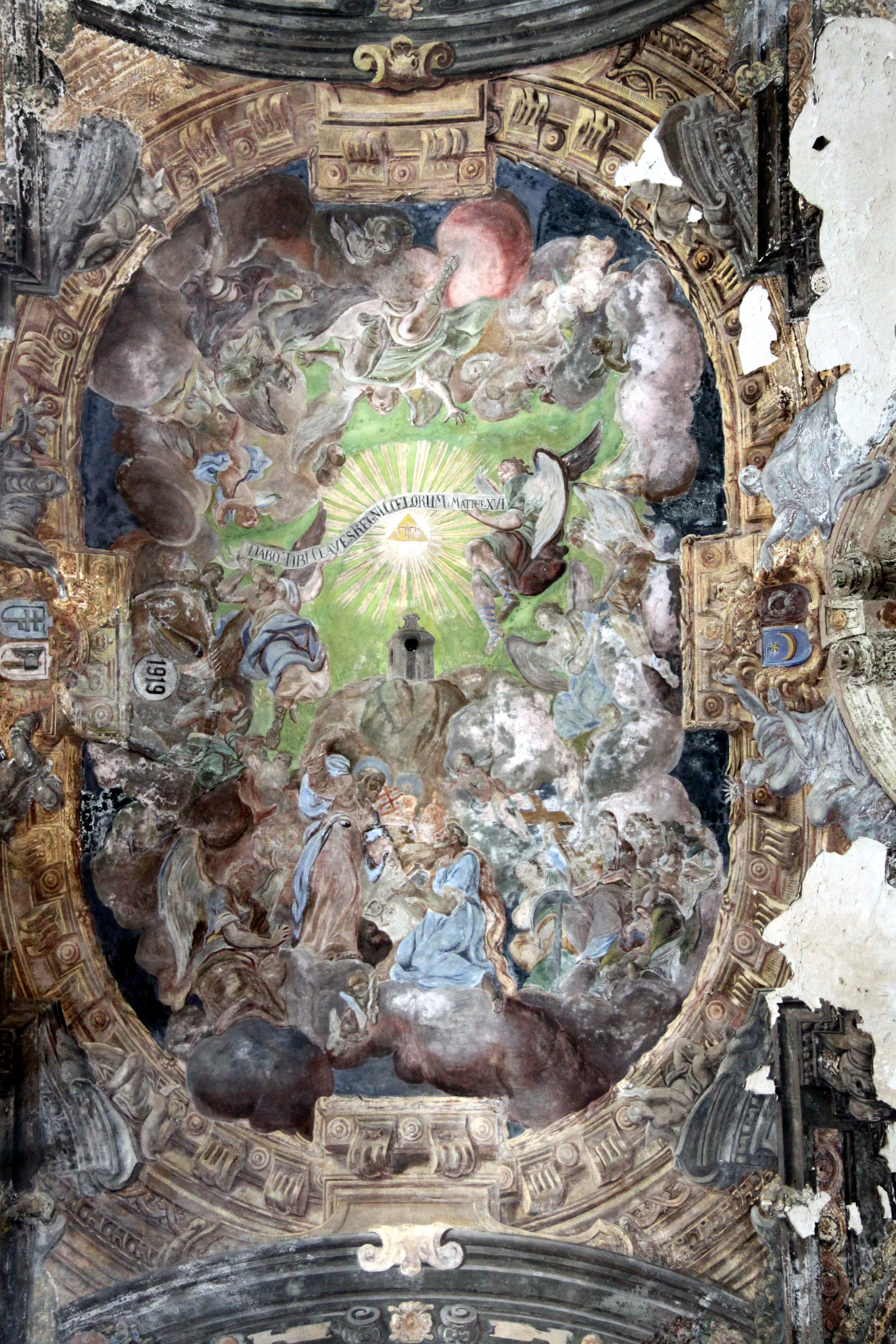 Костел єзуїтів, Львів, Театральна, 13